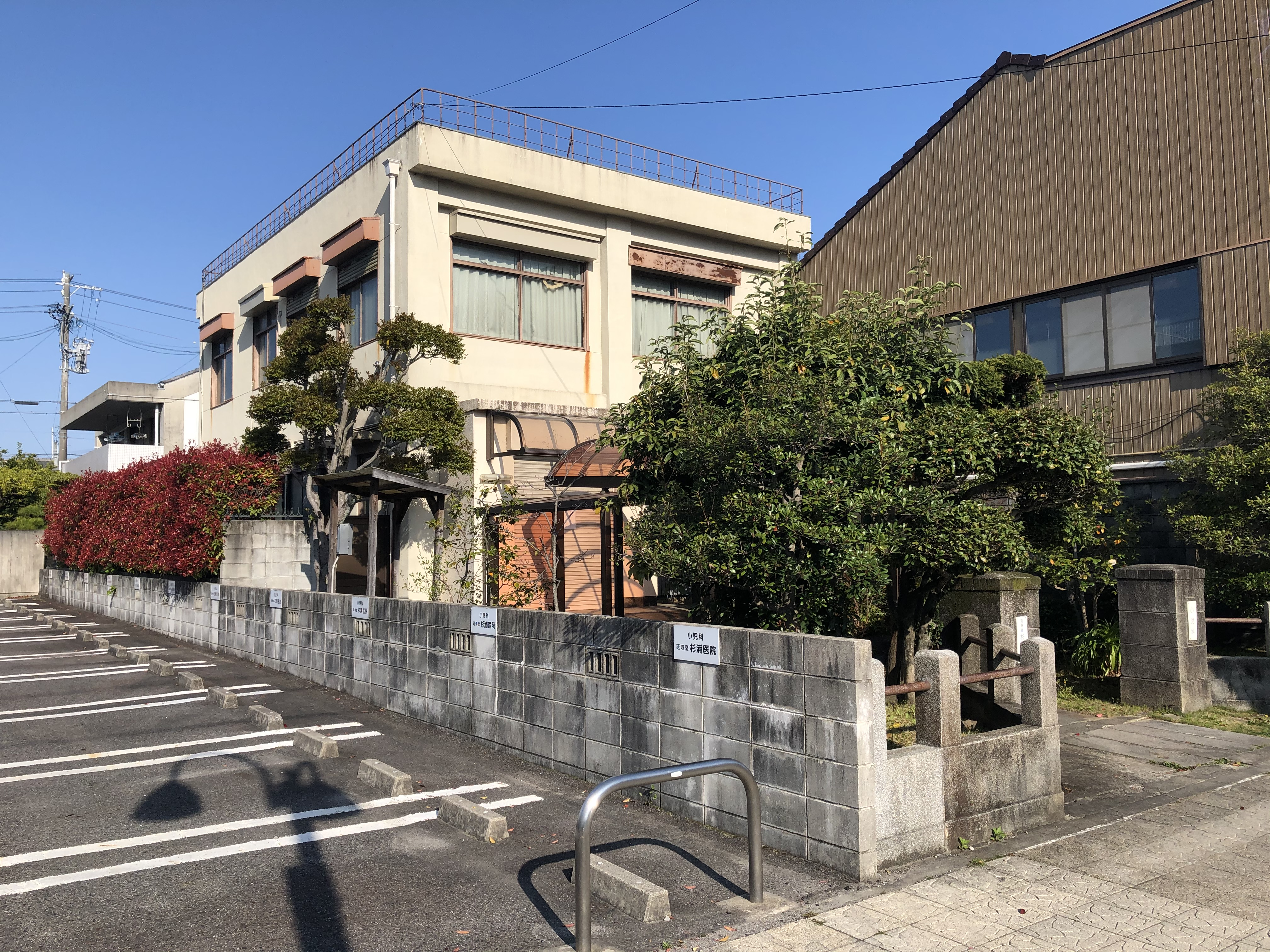 小児科延寿堂杉浦医院（岡崎市能見通）